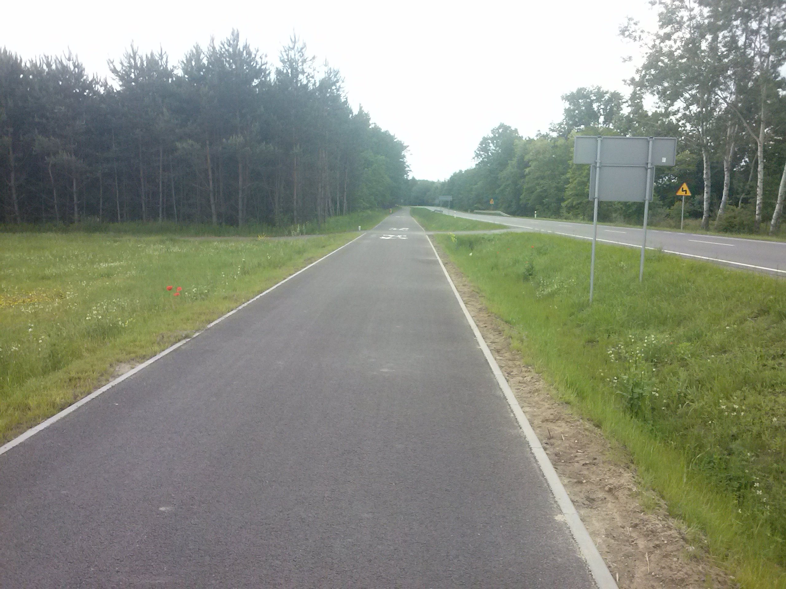 Droga rowerowa przy DW 835 w Gminie Tryńcza - widok od strony Wólki Małkowej, przez las w kierunku Gniewczyny Trynieckiej